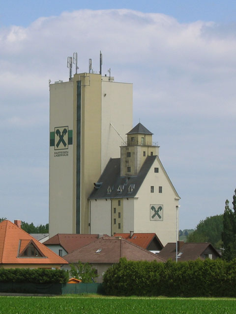 Lagerhaus Angern: Angern an der March, Niederösterreich